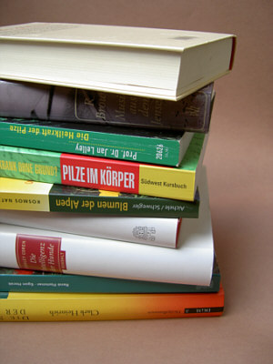 Bücherstapel Fotograf: Walter J. Pilsak, Waldsassen Copyright Status: GNU Freie Dokumentationslizenz